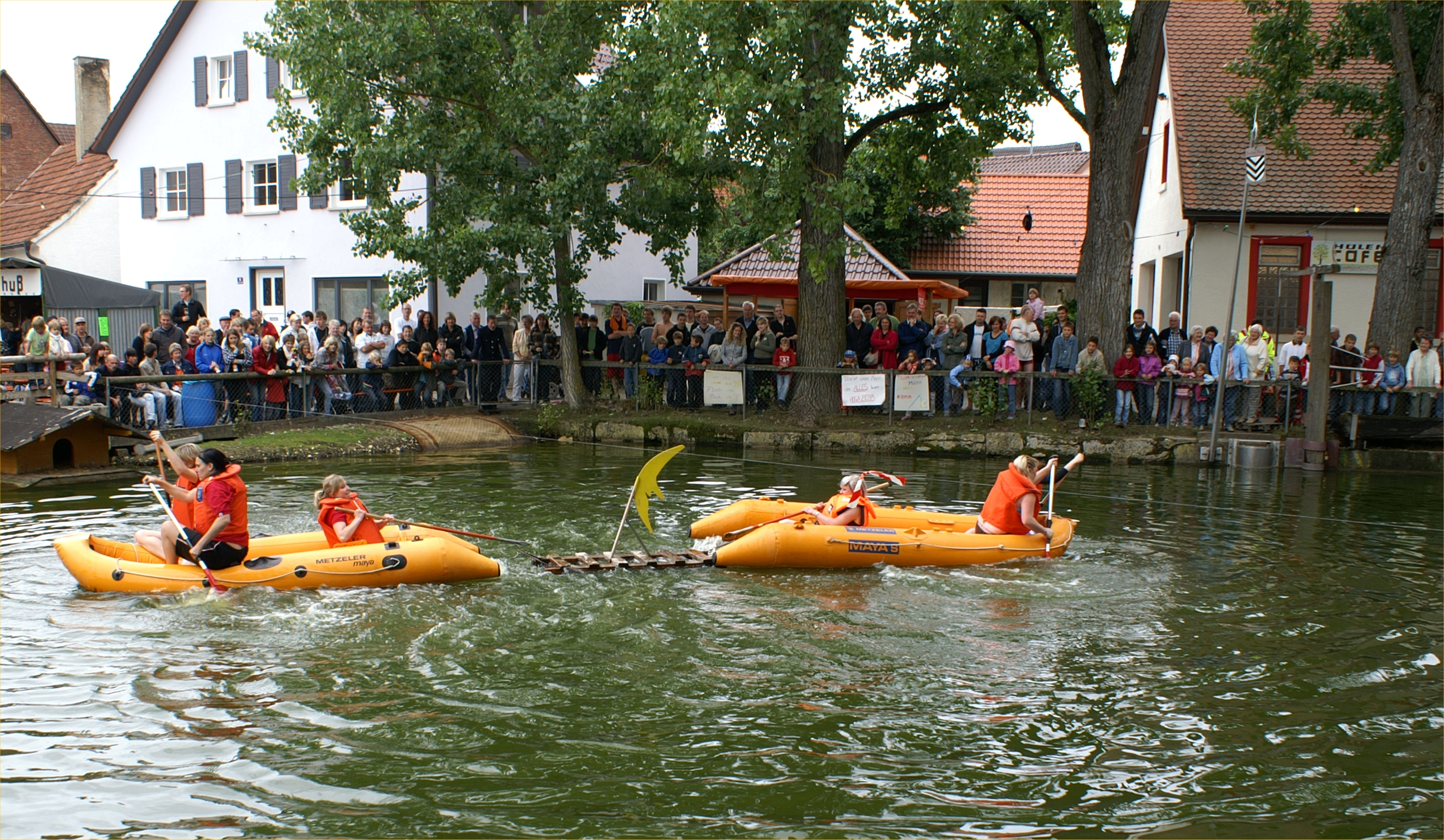 Beim Ascher Hülenfest, das alle zwei Jahre stattfindet, kämpfen auch verschiedene Teams in Schlauchbooten um einen Halbmond ("Ascher Hoga-Ziehen")